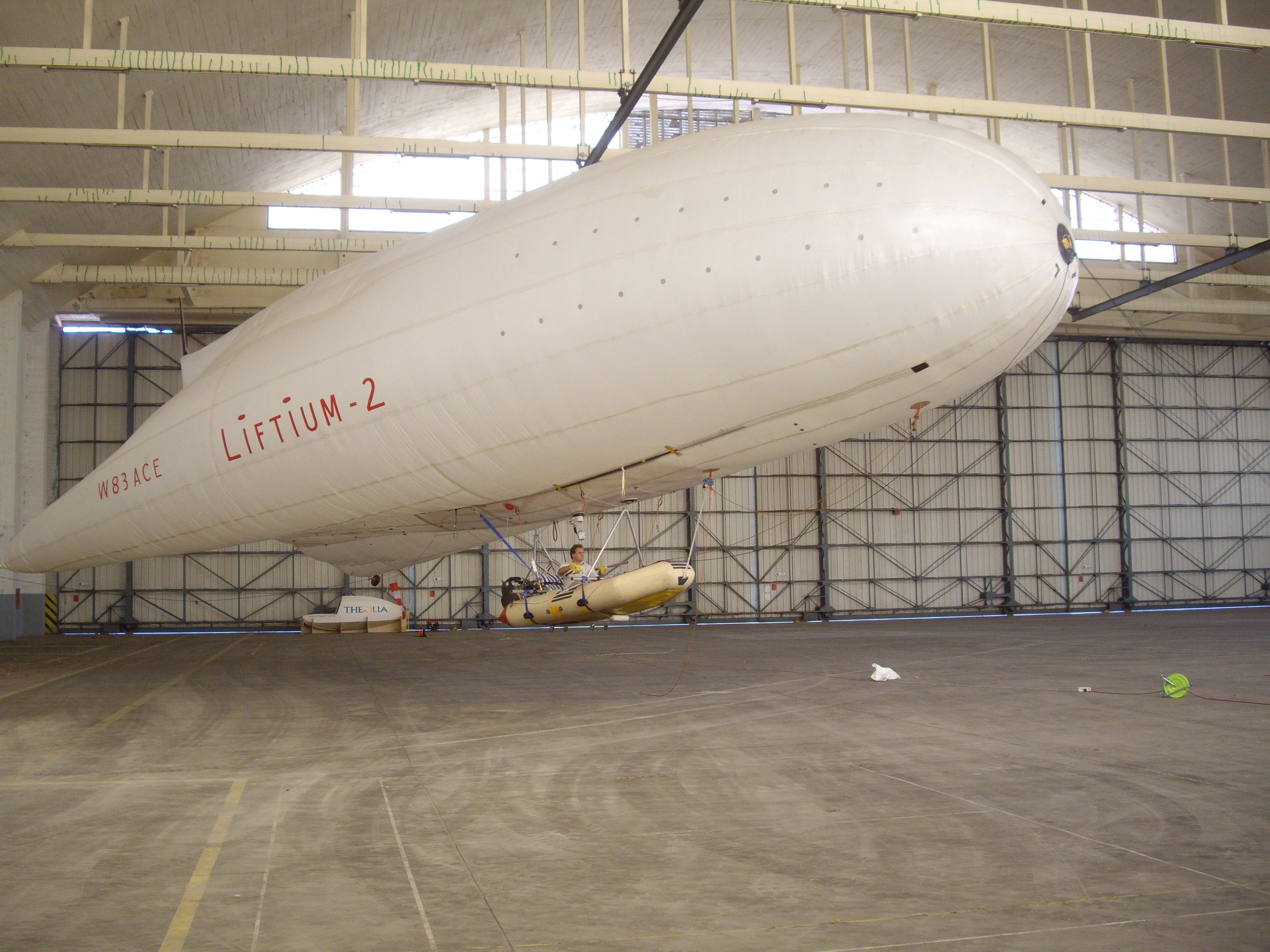 Voilier des airs Liftium 300 de Didier Costes en test dans les Hangars de Saint Mandrier sur Mer